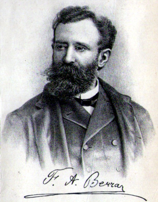 Retrato del escritor uruguayo Francisco Berra (1844-1906) publicado en su obra "Bosquejo Histórico de la República Oriental Del Uruguay", 4ta. edición de 1895.